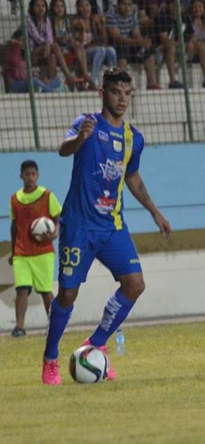 Geovanny Macías contra el Gualaceo.